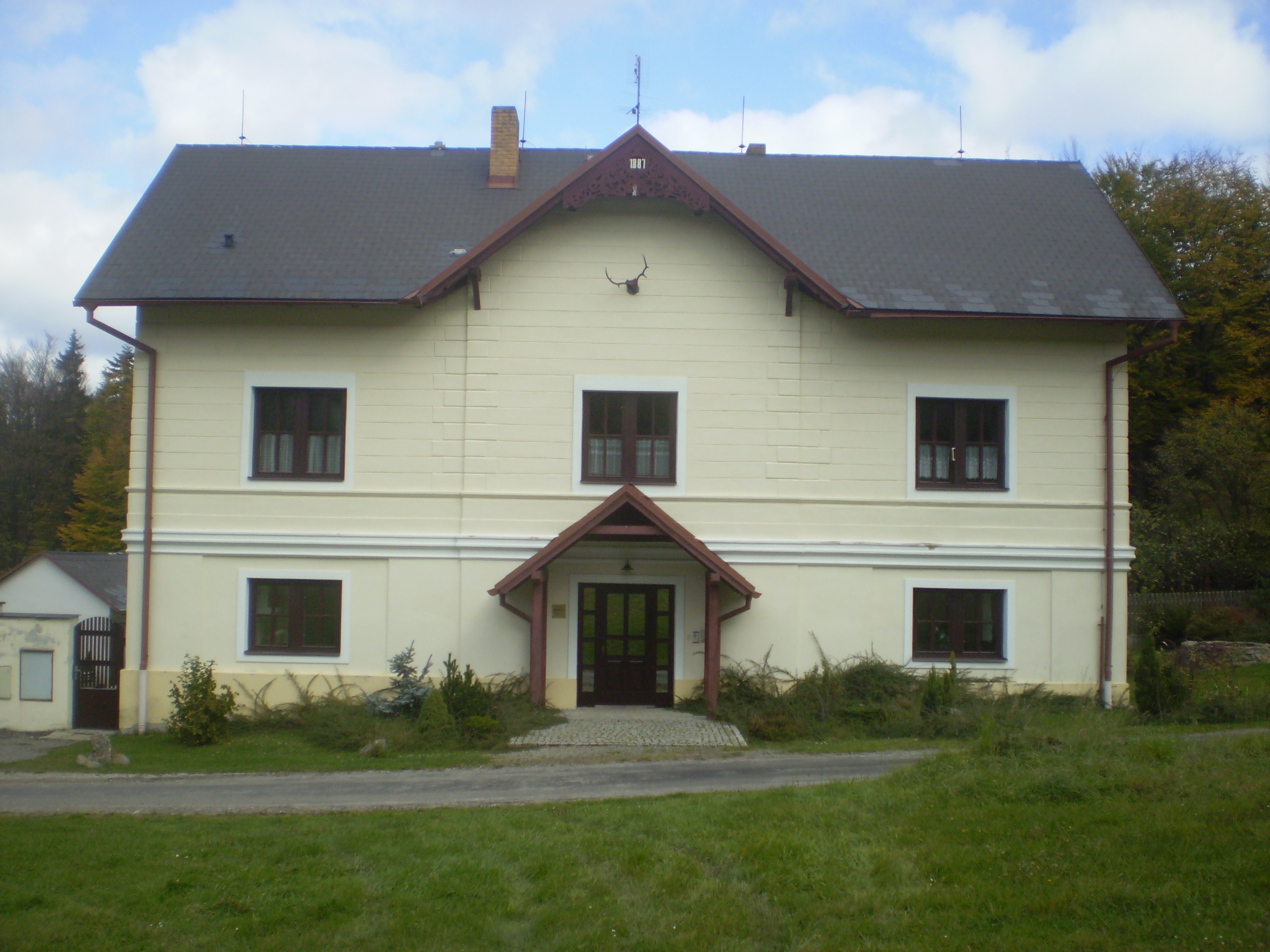 myslivna Korce u Křemešníka